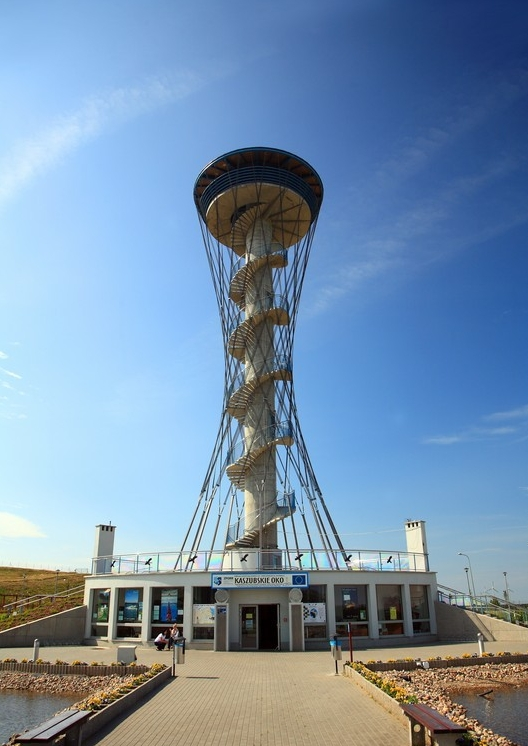 Gniewino, województwo pomorskie, powiat wejherowski, gmina Gniewino